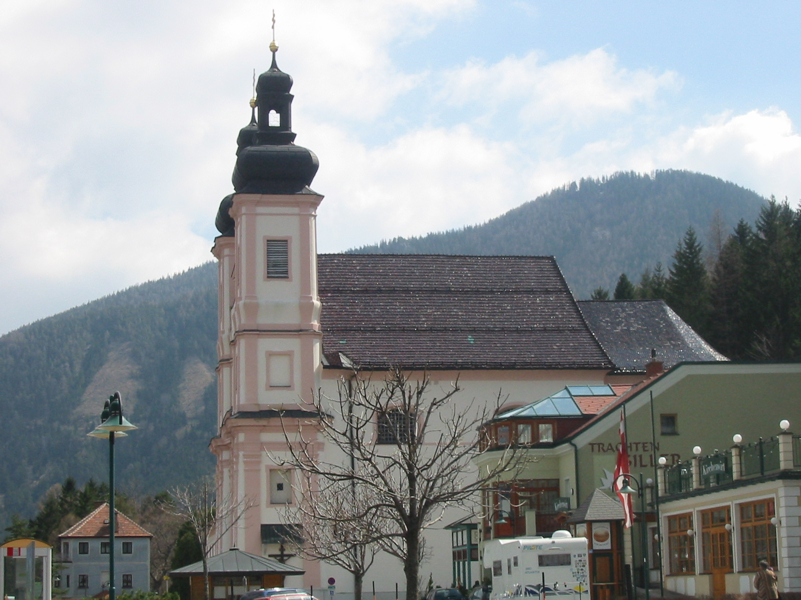 Wallfahrtsort Maria Schutz